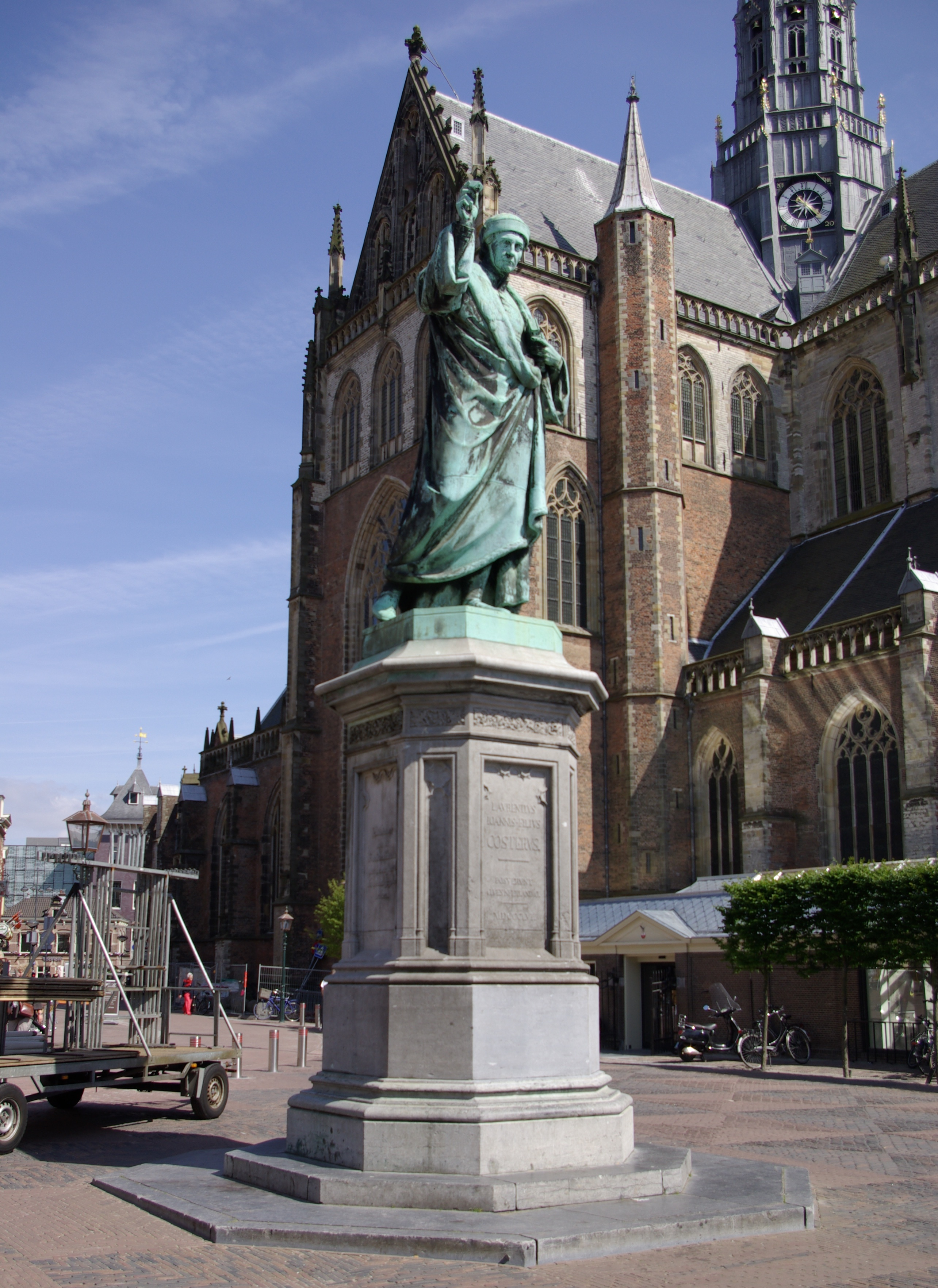 Standbeeld van Laurens Janszoon Coster in Haarlem